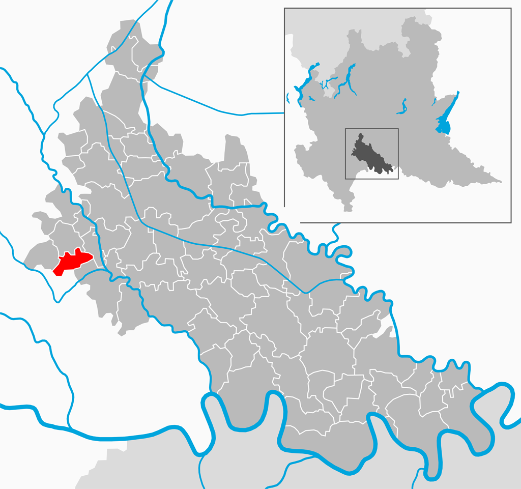 Il comune di Marudo nella provincia di Lodi